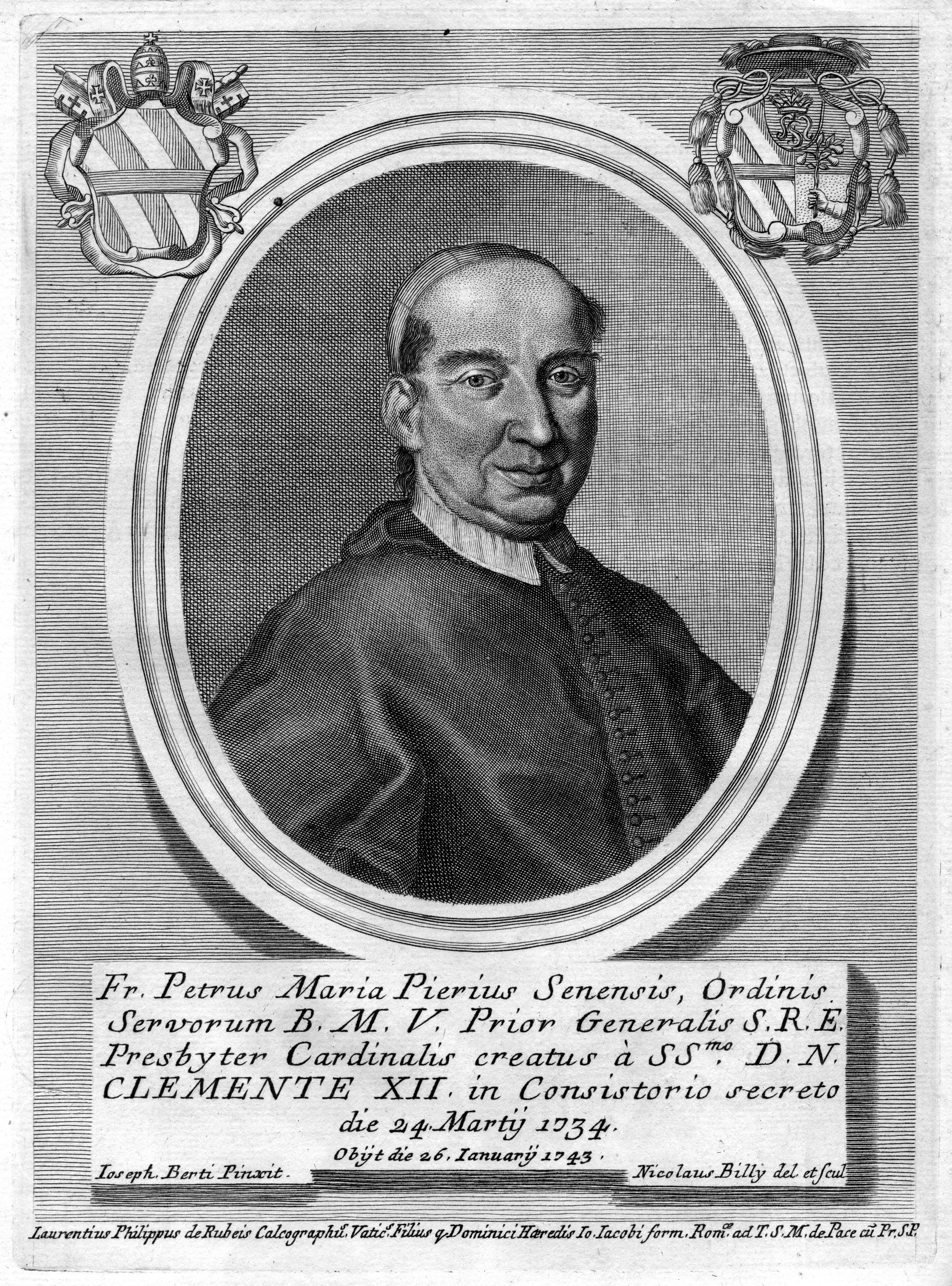 Portrait de Pietro Maria Pieri (1676-1743)